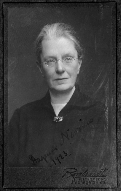 Dagmar Neovius; pysty, mustavalkoinen